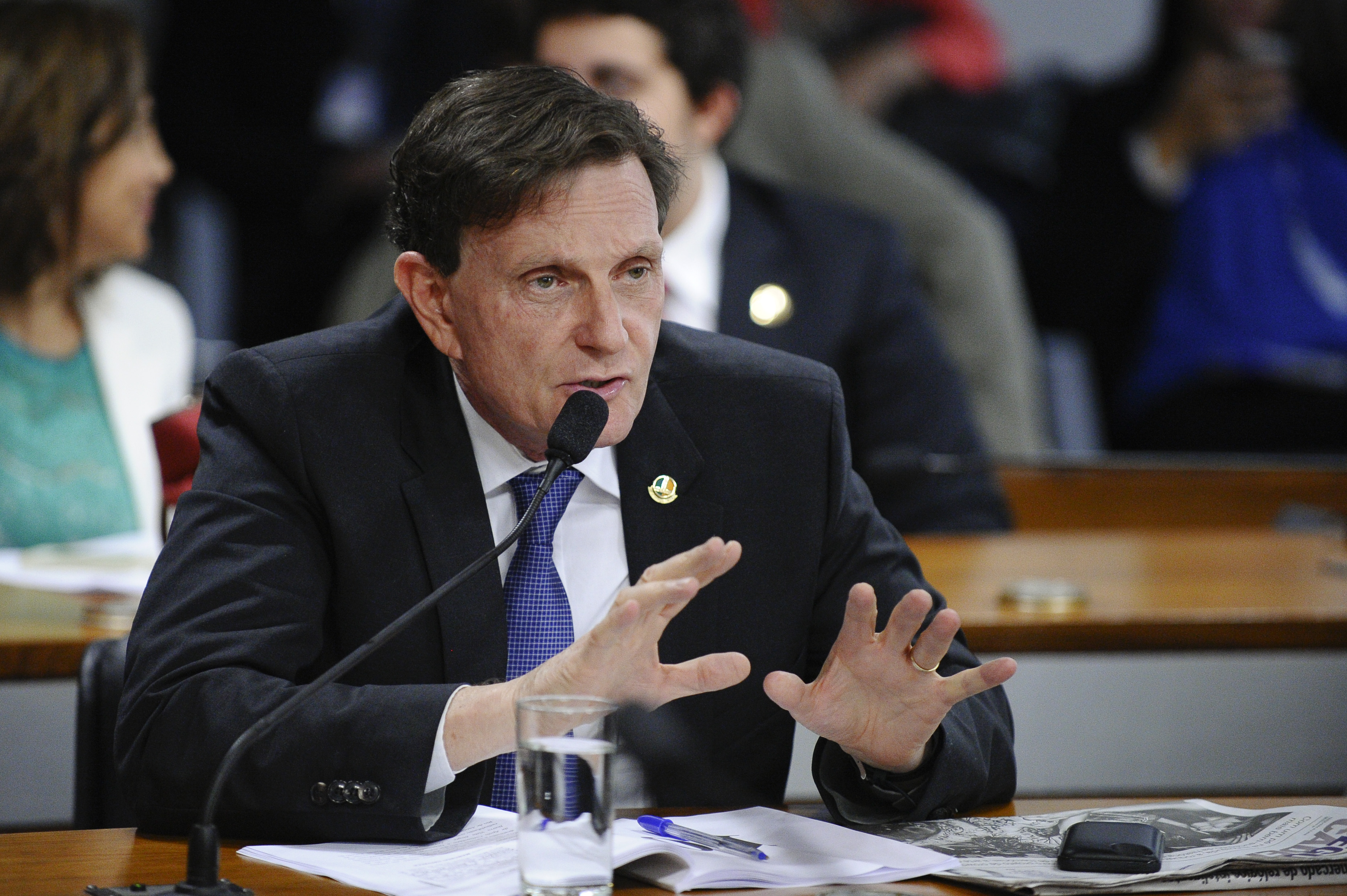 Sala de comissões do Senado Federal durante Comissão de Ciência, Tecnologia, Inovação, Comunicação e Informática (CCT) que faz reunião deliberativa com 18 itens, sendo 2 projetos, 4 requerimentos e, o restante, outorga de rádios. Em pronunciamento, Marcelo Crivella (PRB-RJ). Foto: Edilson Rodrigues/Agência Senado